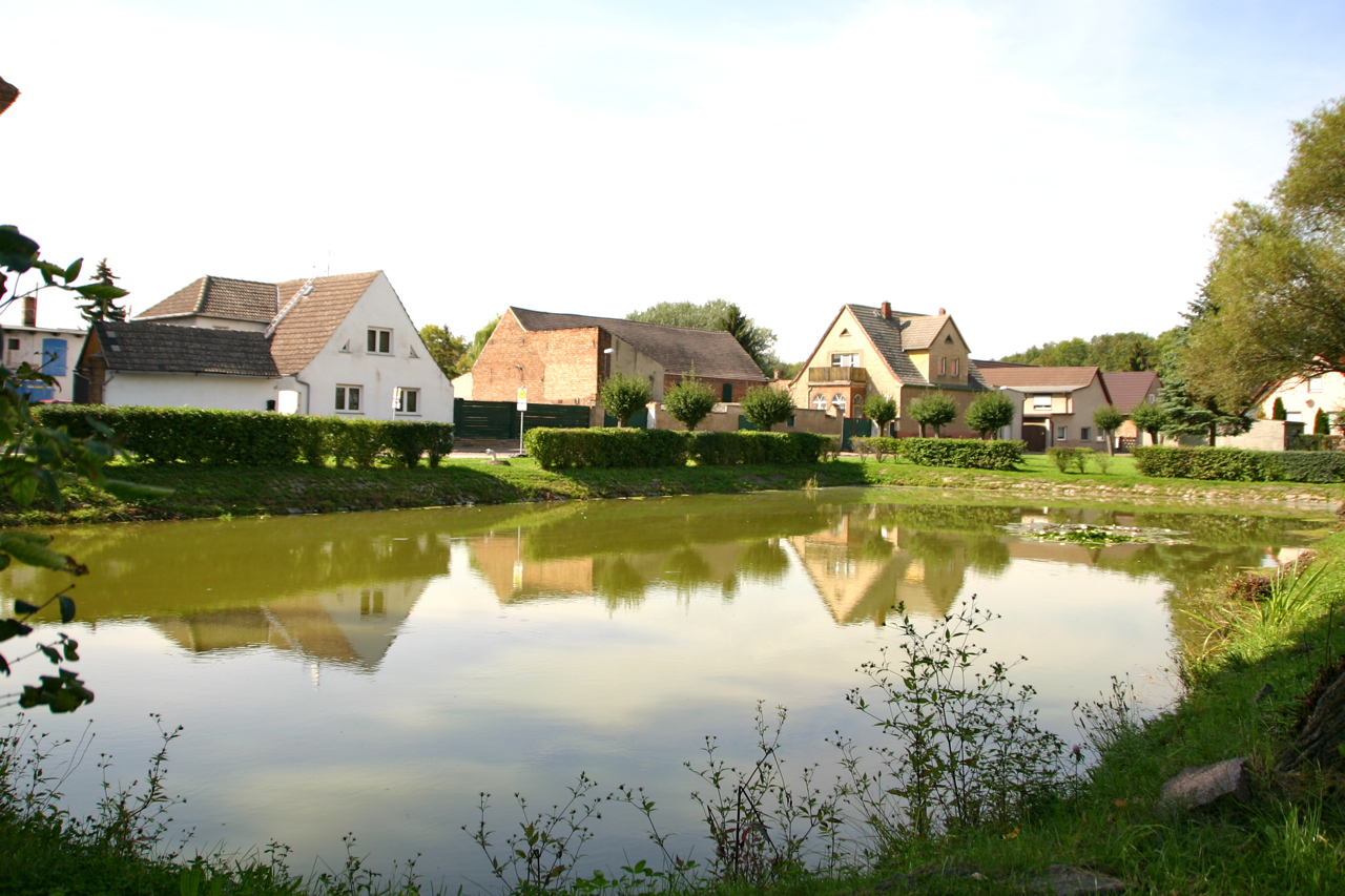 Scheuder ist ein Teil der Stadt Südliches Anhalt in Sachsen-Anhalt.